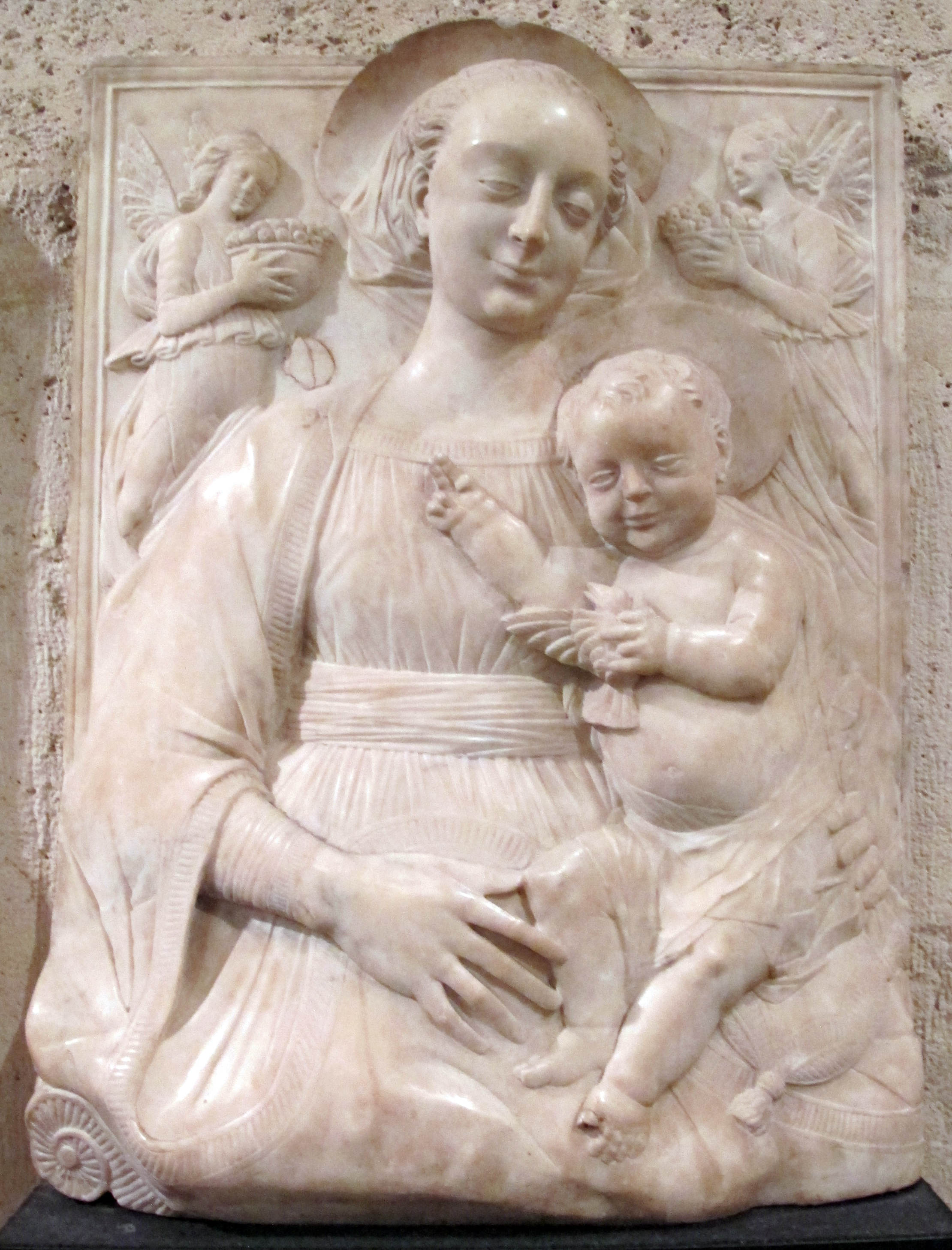 Scultura italiana, Louvre